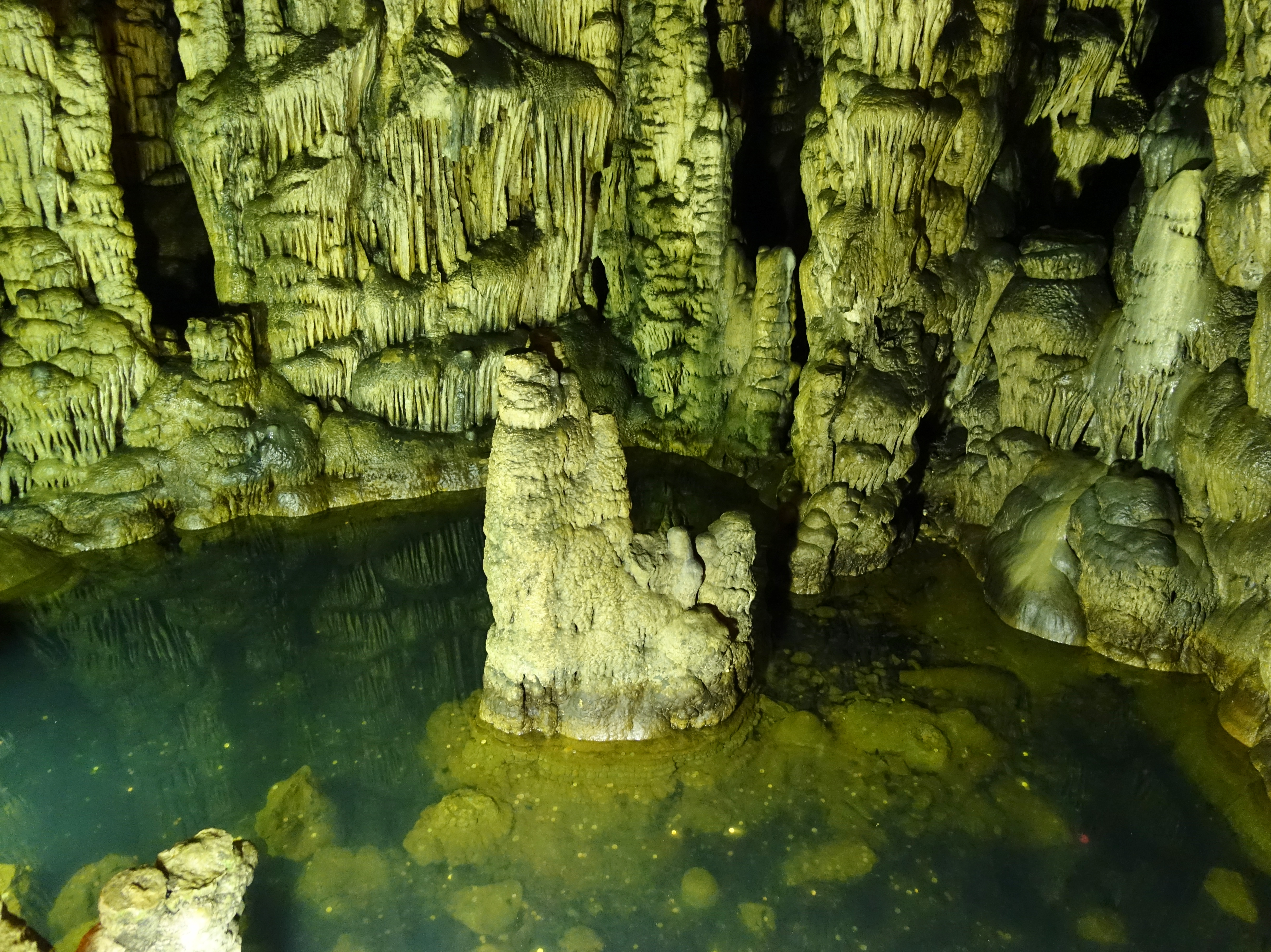 Diktäische Grotte (Δικταίον Αντρον) bei Psychro (Ψυχρό), Regionalbezirk Lassithi, Kreta, Griechenland